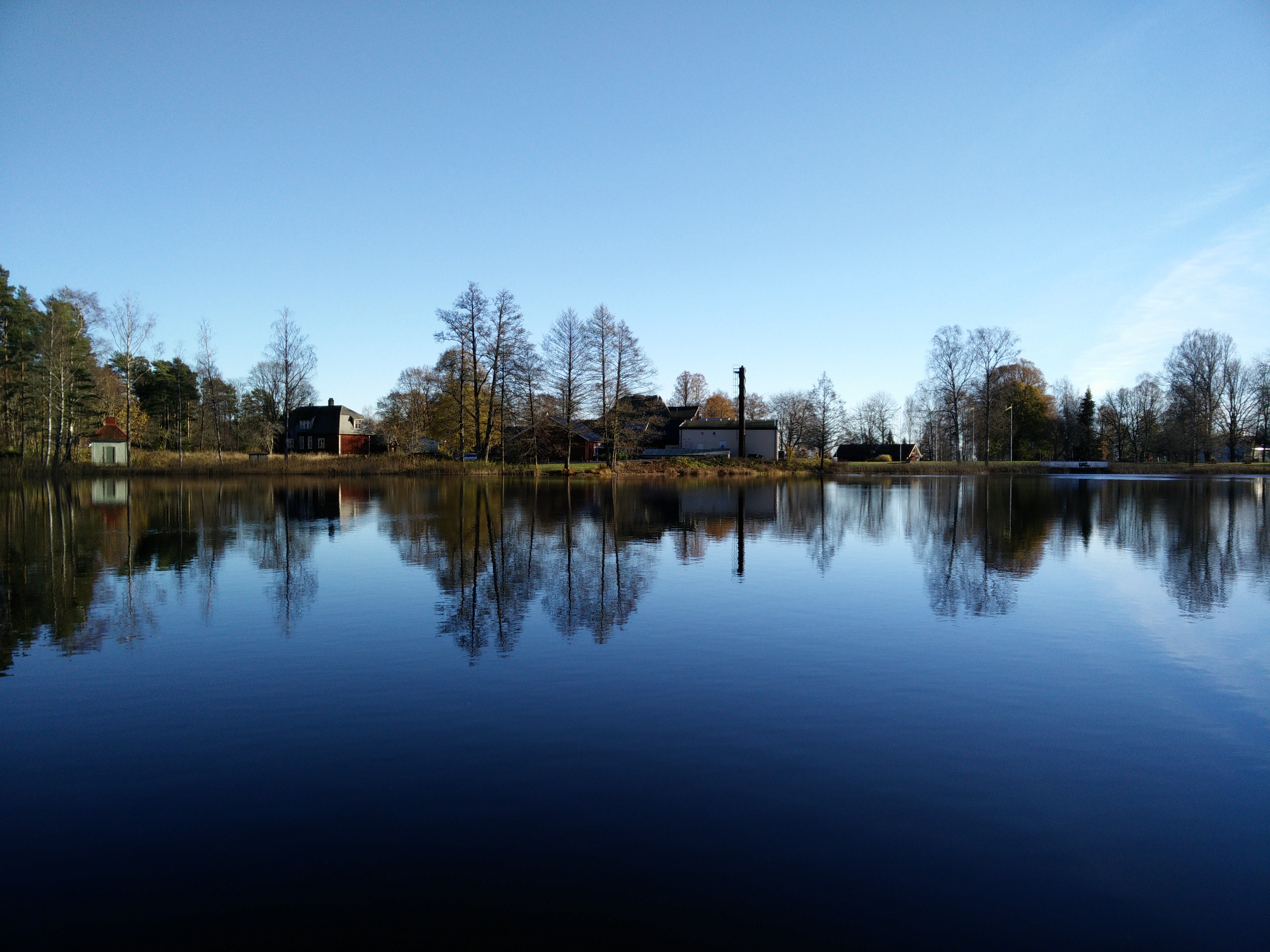 Huvudbyggnaden vid Kroppefjälls sanatorium i Dals Rostock, Melleruds kommun, med sjön Mörttjärn i förgrunden.